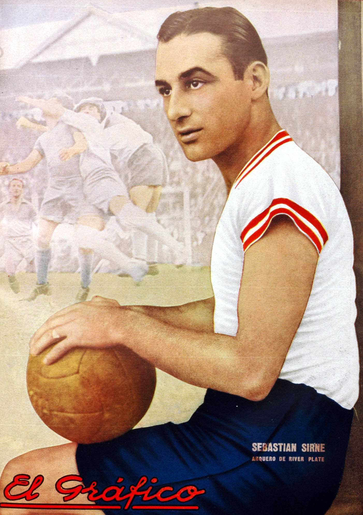 El Grafico del 15 de Junio de 1935. Edicion 831